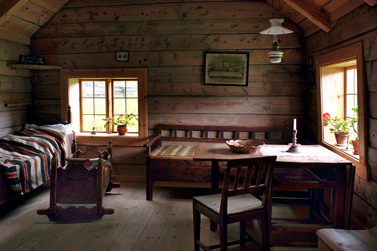 Husmannsstova til Nils og Marte Movik står i dag på Sunnfjord Museum.